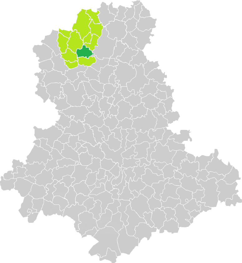 Carte de situation de la commune du Dorat (en vert foncé) dans le votre Canton (en vert clair) sur une carte des communes de la Haute-Vienne